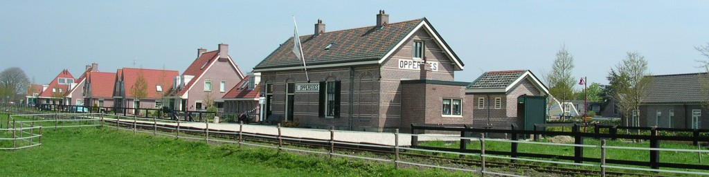 Het treinstation van Opperdoes Trainstation of Opperdoes